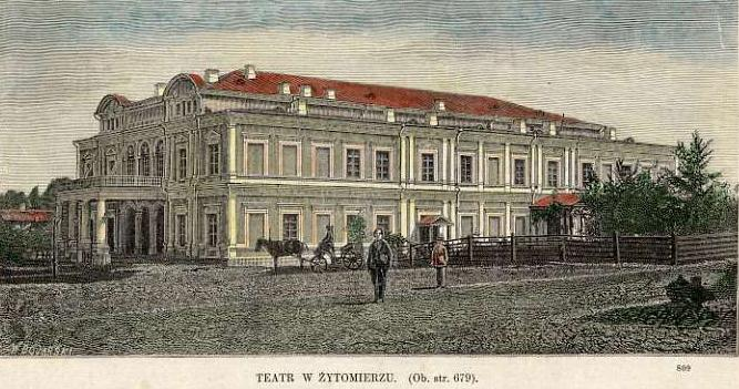 Житомирський театр на поч. 1870-х років